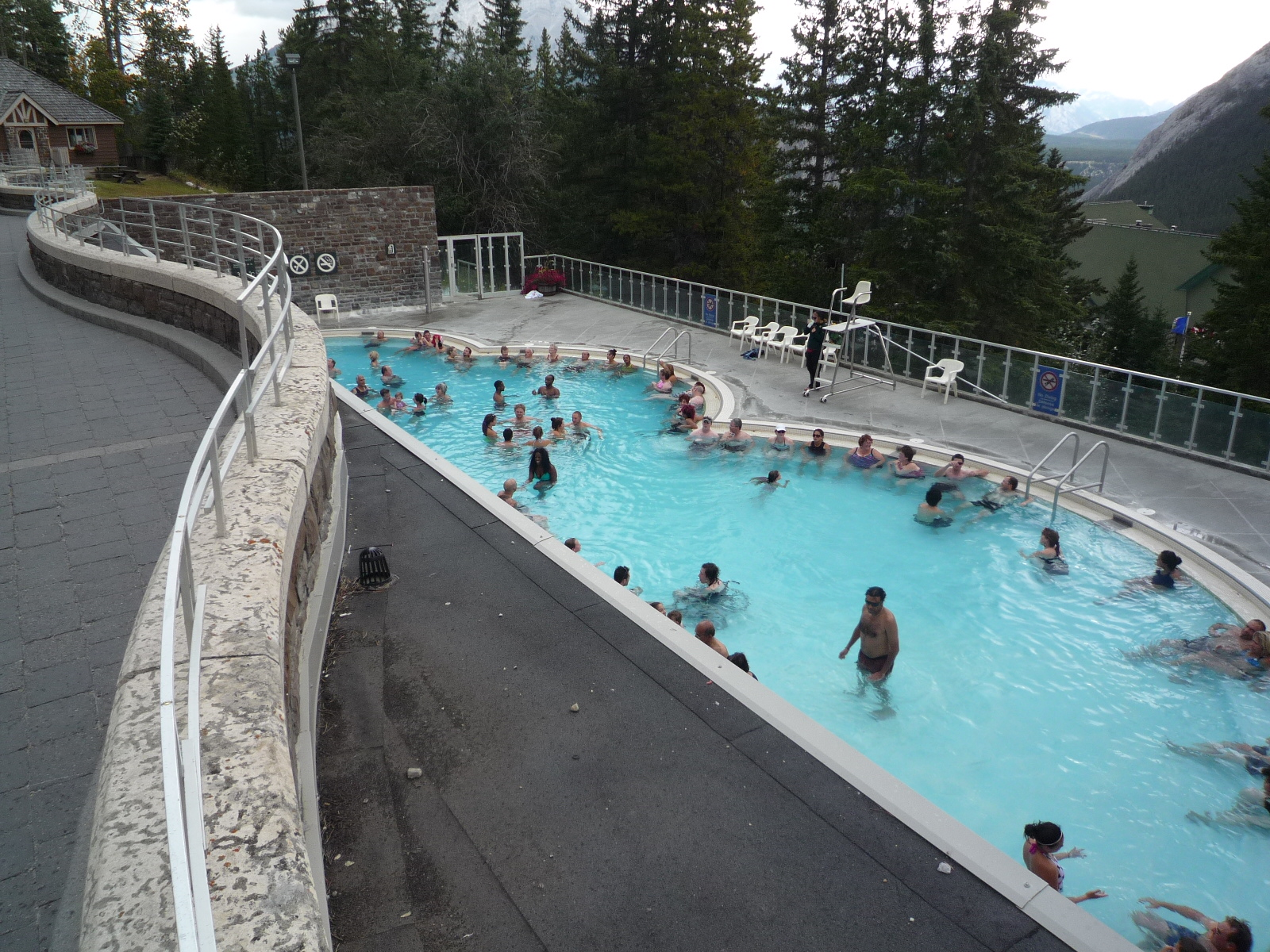 バンフアッパーホットスプリングス